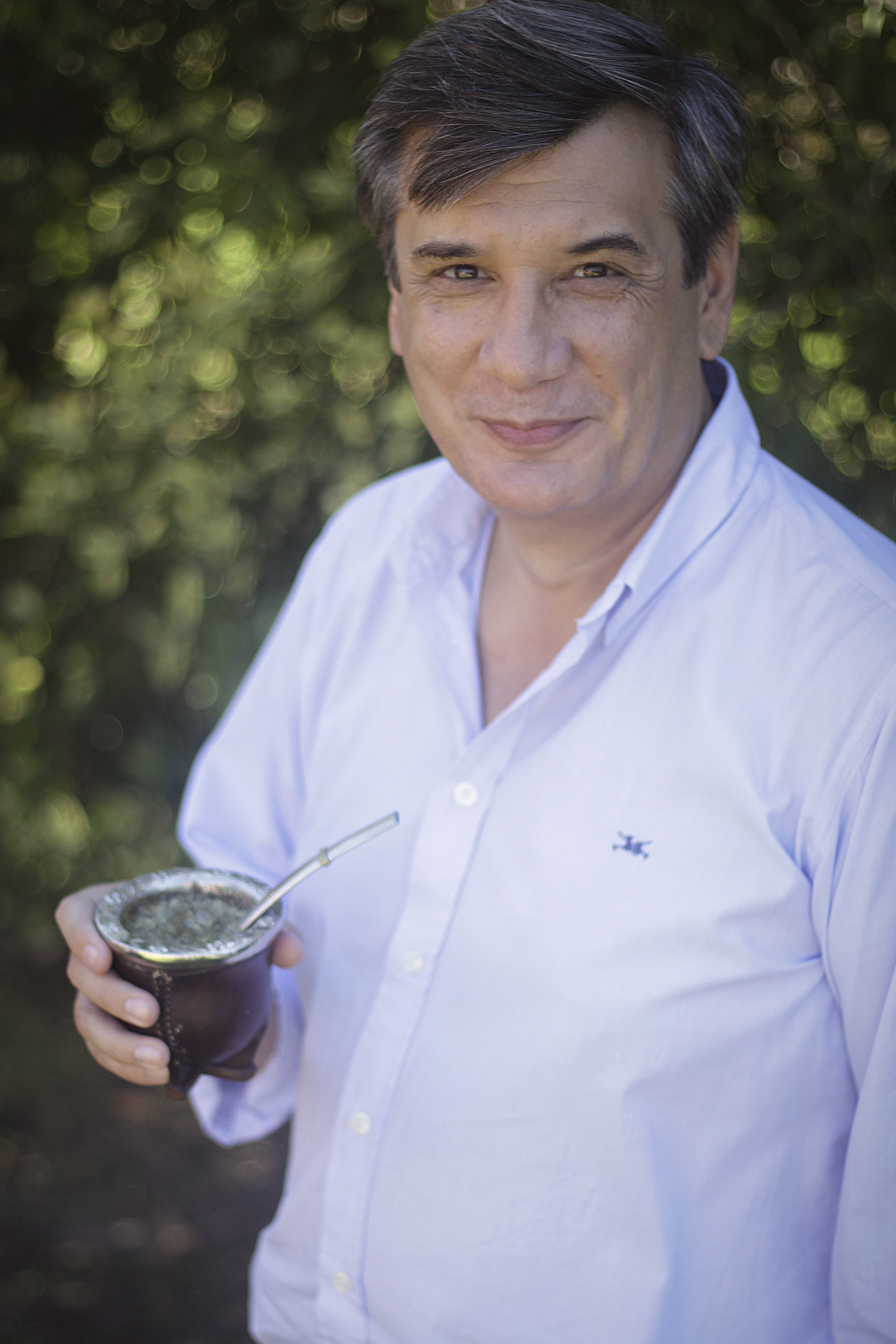 Mate